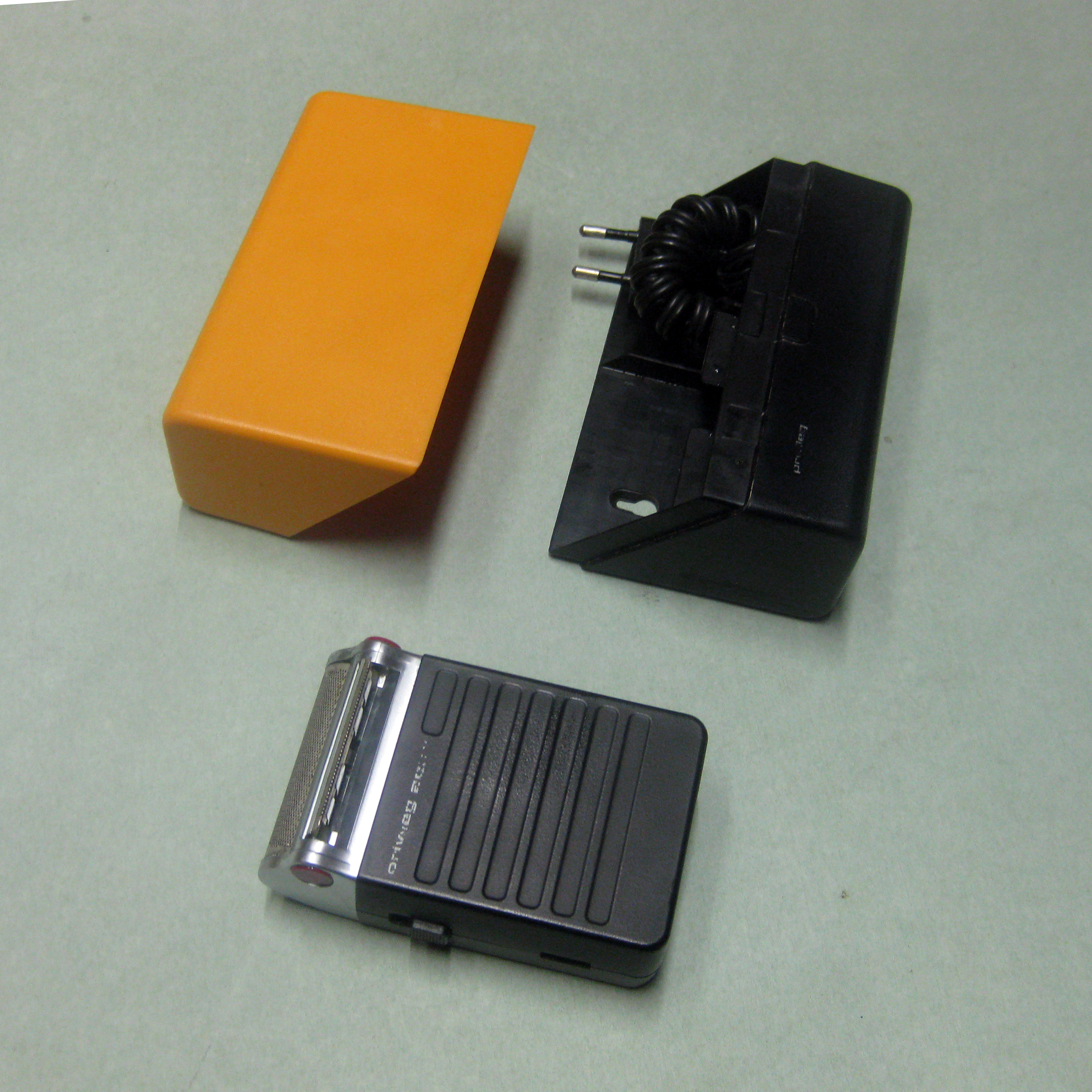 Privileg-Rasierer hergestellt von Moser